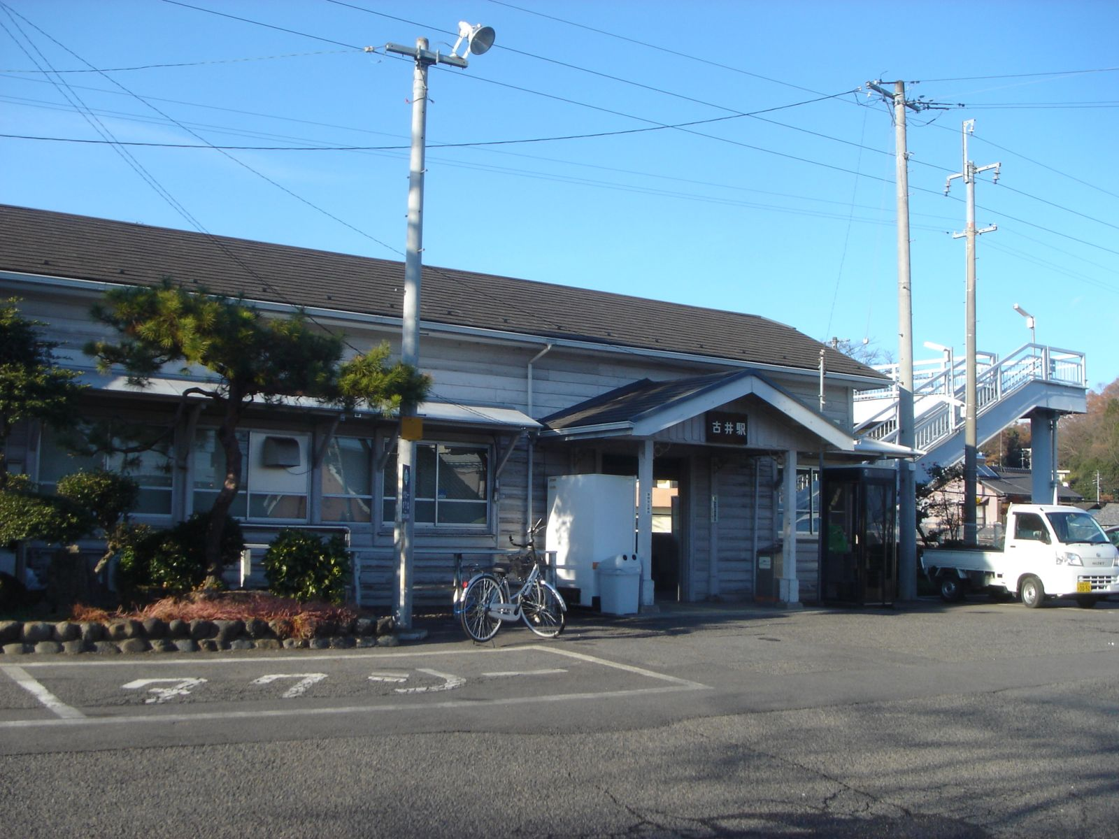 Kobi Station（古井駅）,Minokamo,Gifu,Japan(岐阜県美濃加茂市)で撮影。